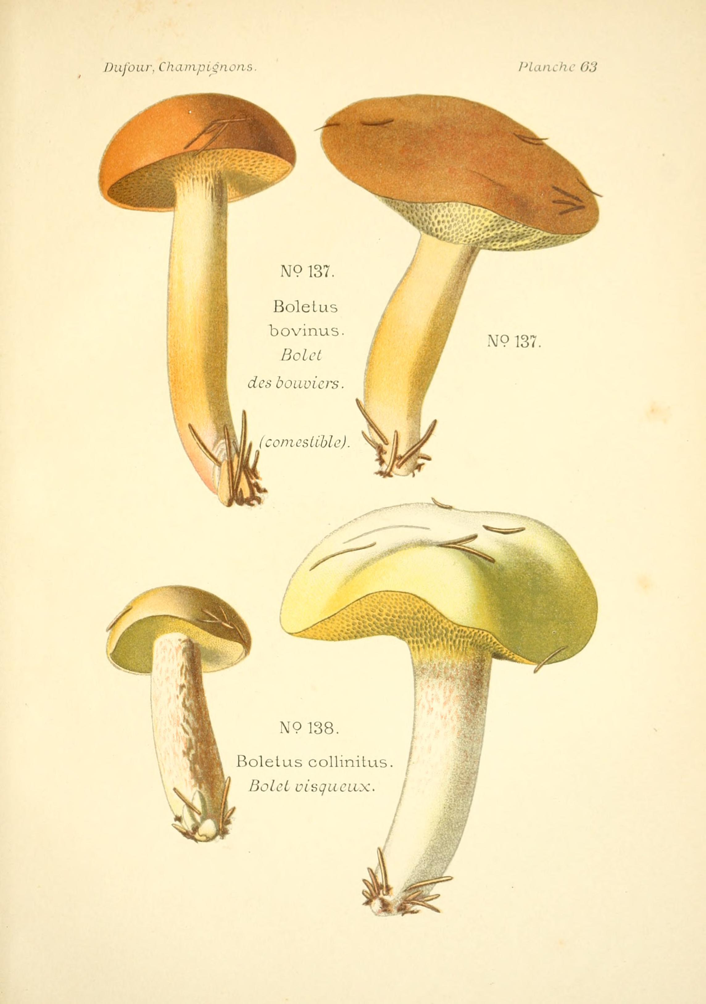 Atlas des champignons comestibles et vénéneux.